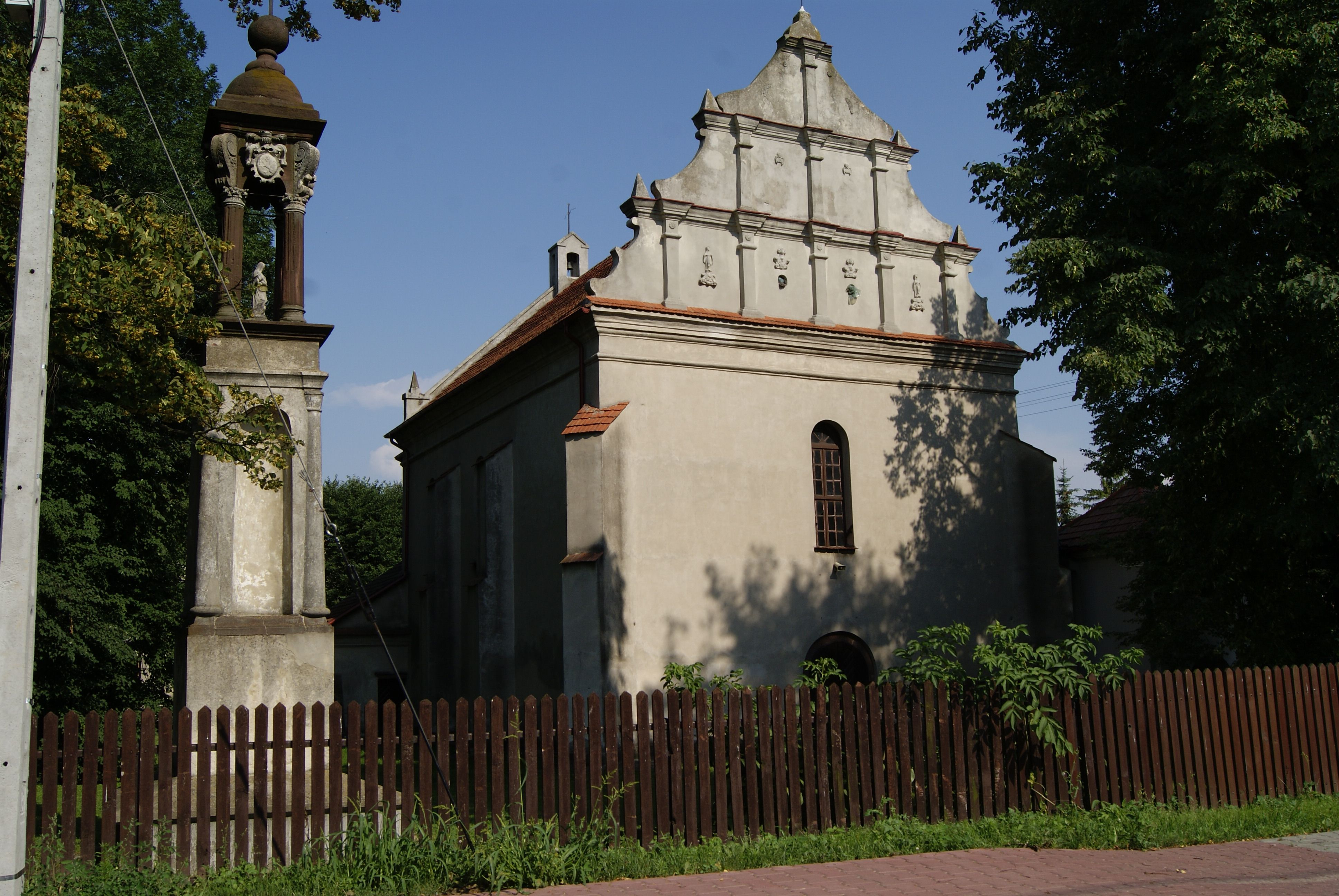 Markuszów - zespół kościoła szpitalnego p.w. Św. Ducha: kościół szpitalny p.w. Św. Ducha (zabytek nr A/541 z 29.12.1971 i kl.V-Oa/110/56 z 8.08.1956)